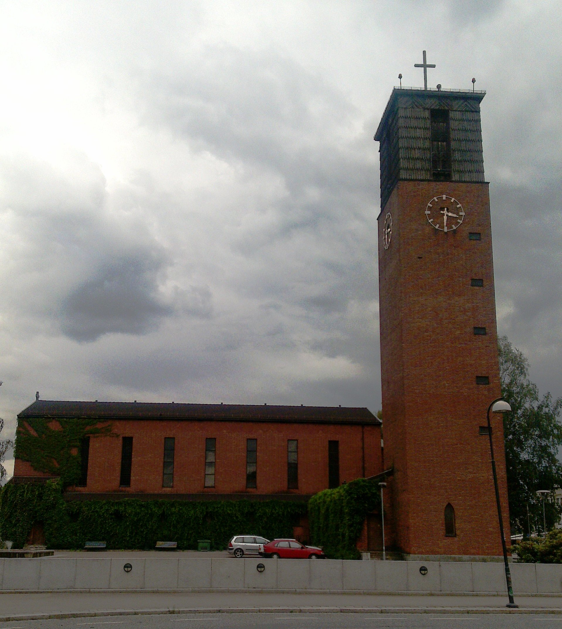 Lillestrøm kirke, Skedsmo kommune (Akershus)